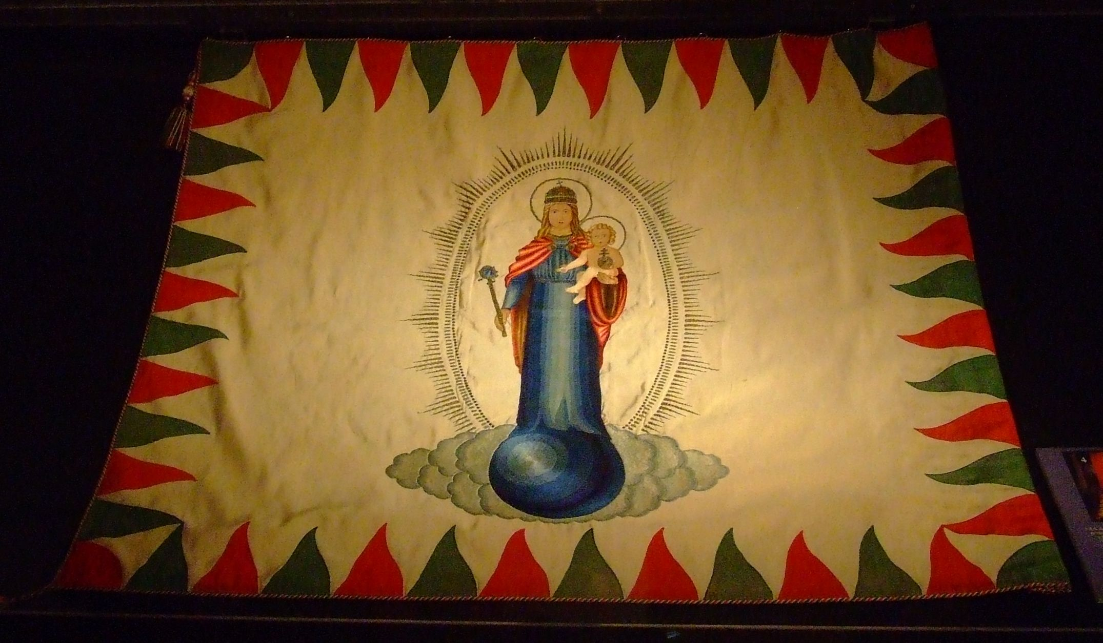 1848–1849-es honvéd zászló Military History Institute and Museum LocationBudapestCoordinates47° 30′ 15″ N, 19° 01′ 38″ E Established1922Web page control : Q1032469 ISNI: 0000 0001 0860 6822